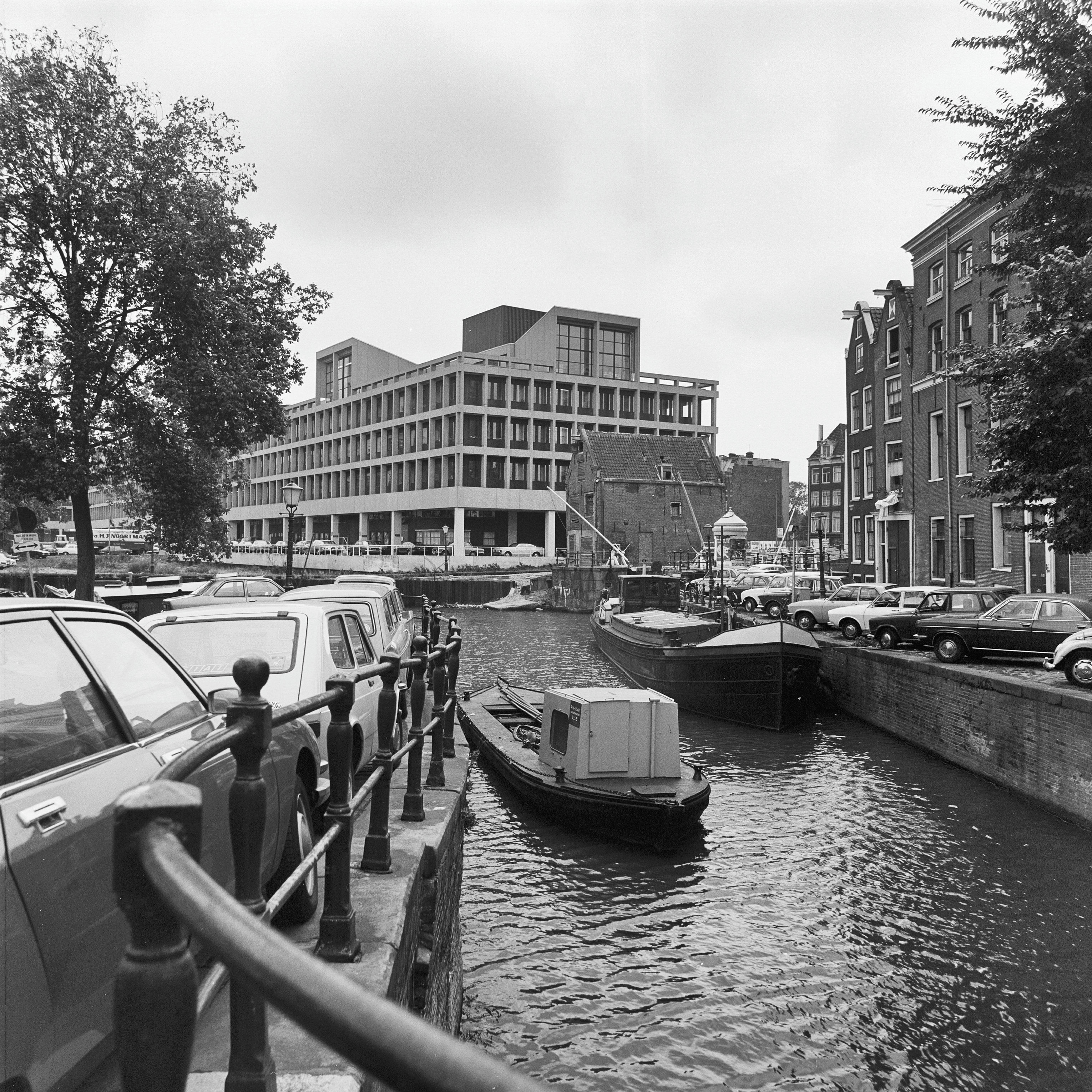 Overzichten: overzicht Snoekjesgracht vanaf de Snoekjesbrug naar de Sint Antoniessluis, met op de achtergrond het Maupoleum (bouwjaar 1971, gesloopt 1994.)